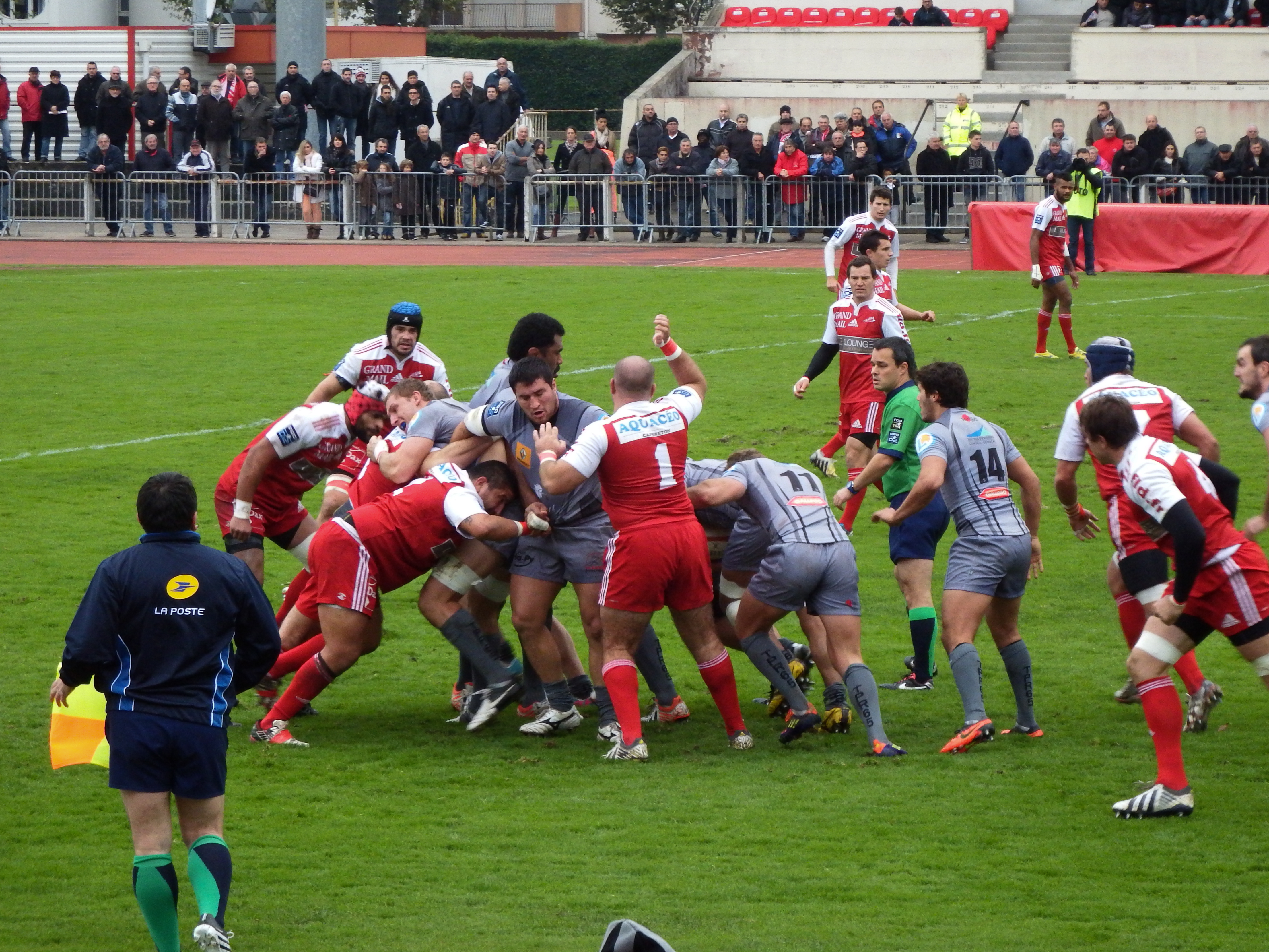 Pro D2 2013-2014 — 24 November 2013, Stade Maurice-Boyau. Match between: US Dax — Tarbes Pyrénées rugby